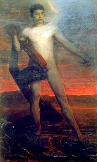 La foto rappresenta l'opera di Fra Paolo - Augusto Mussini descritta nel titolo, conservata nella Chiesa di San Francesco d'Assisi.